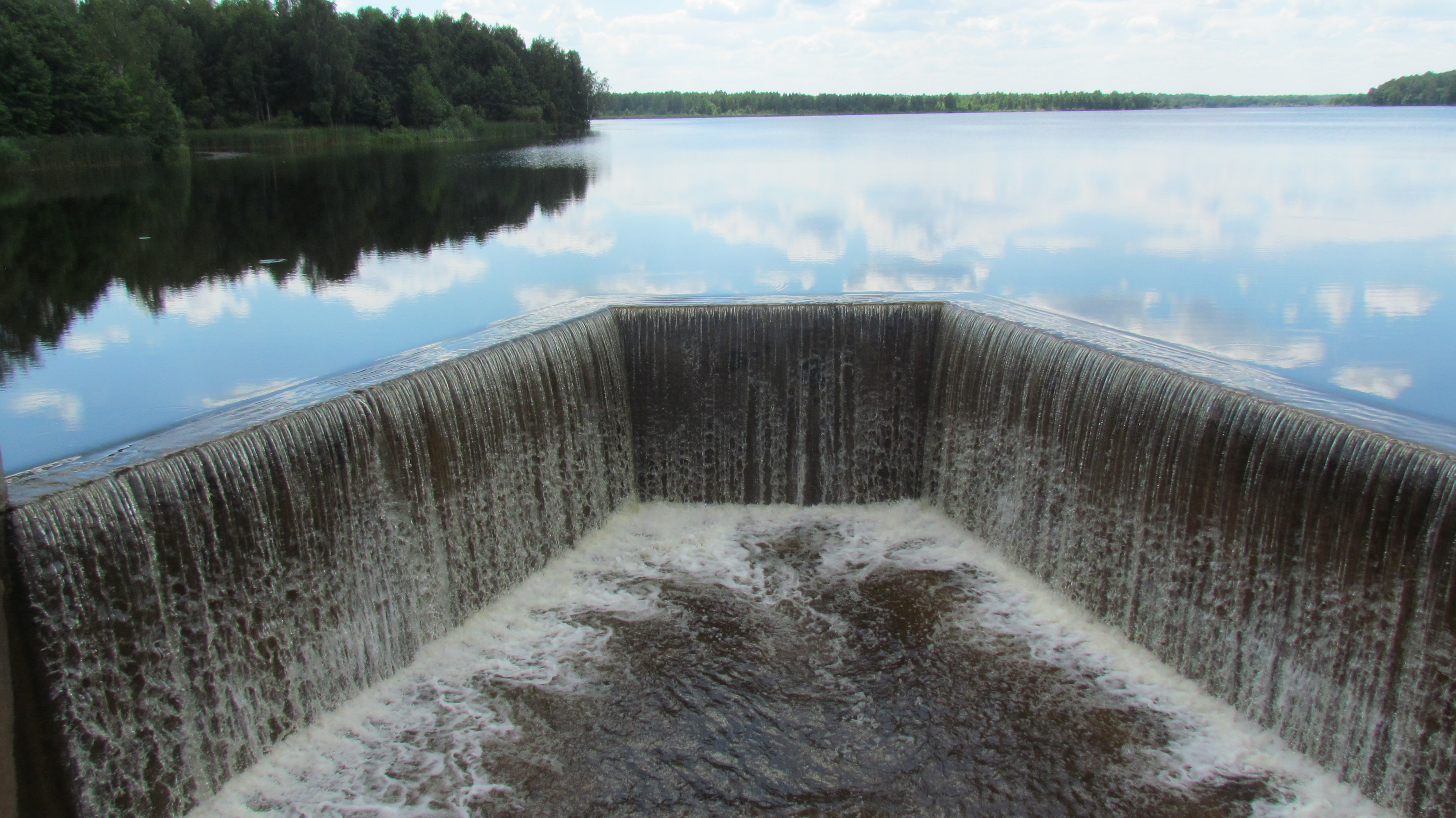 Санітарна гребля на річці Тетерів